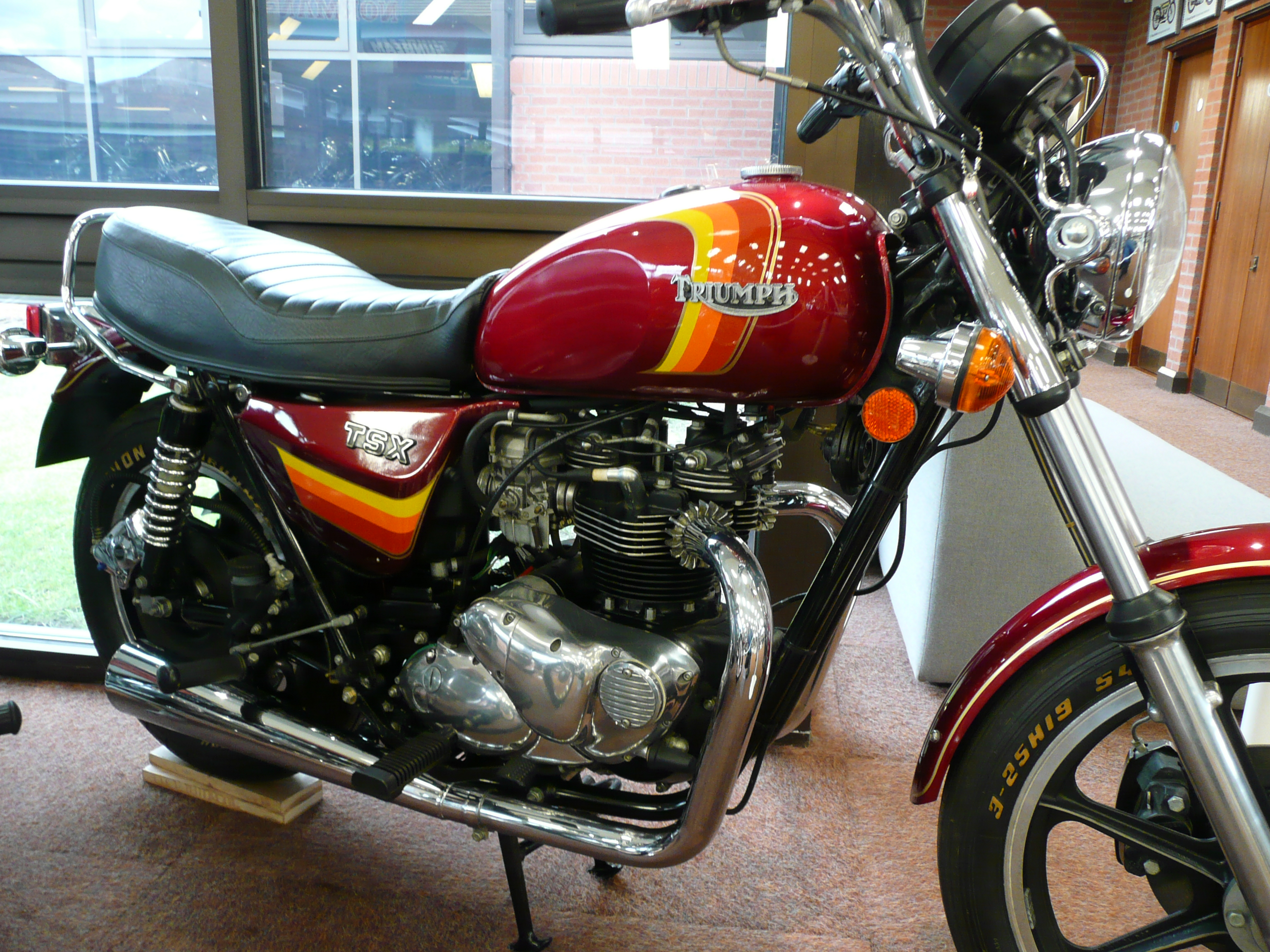 Triumph T140 TSX 1981